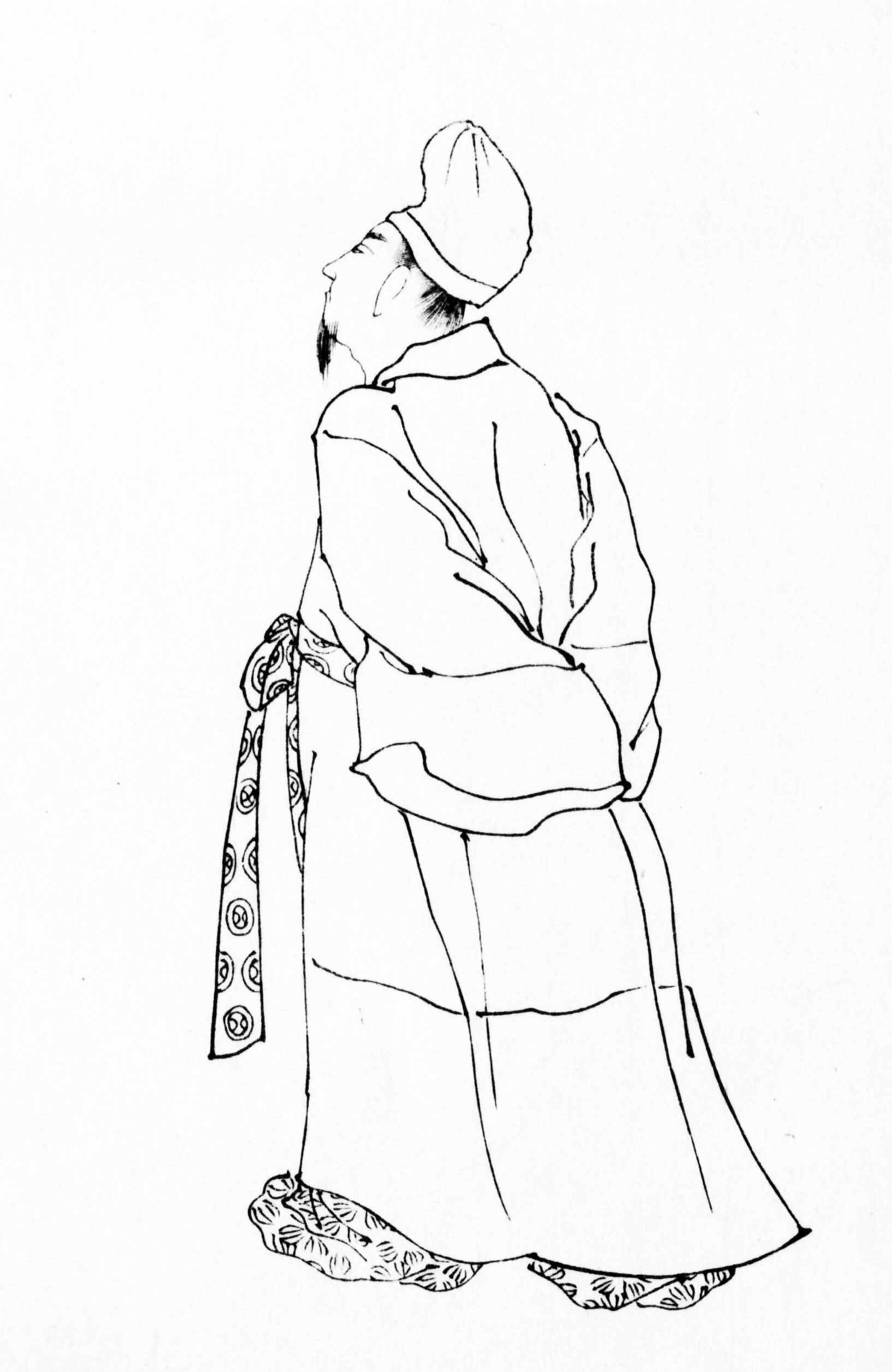 明日香親王-前賢故実